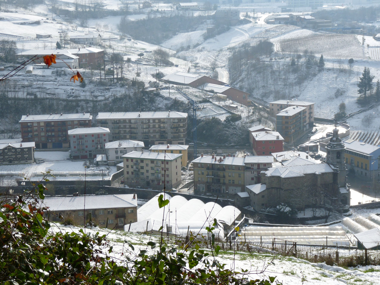 Ibarra elurtua, Izaskunetik ikusita.